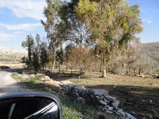 عين الحاج حسن التاريخية على تخوم بلدة عبا من جهة الزرارية